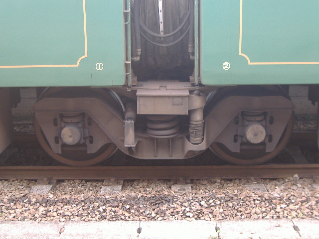 truck